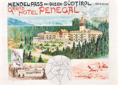 Wilhelm Humer Plakat „Mendel-Pass bei Bozen-Südtirol – Grand Hotel Penegal“, 1896 Lithografie, 74,5 x 95,8 cm Druckerei Kunstanstalt Müller & Trüb Aargau